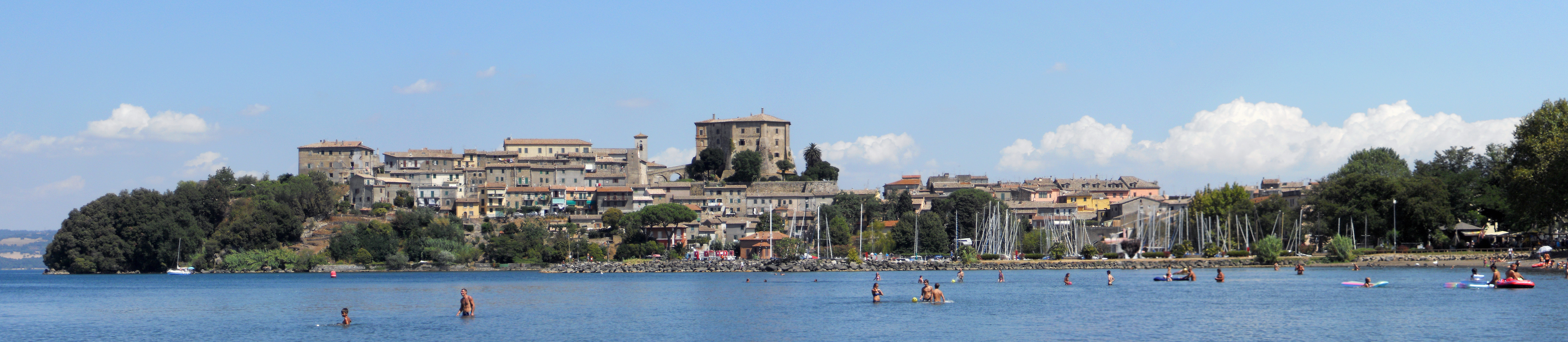 Panorama di Capodimonte (VT), Italia